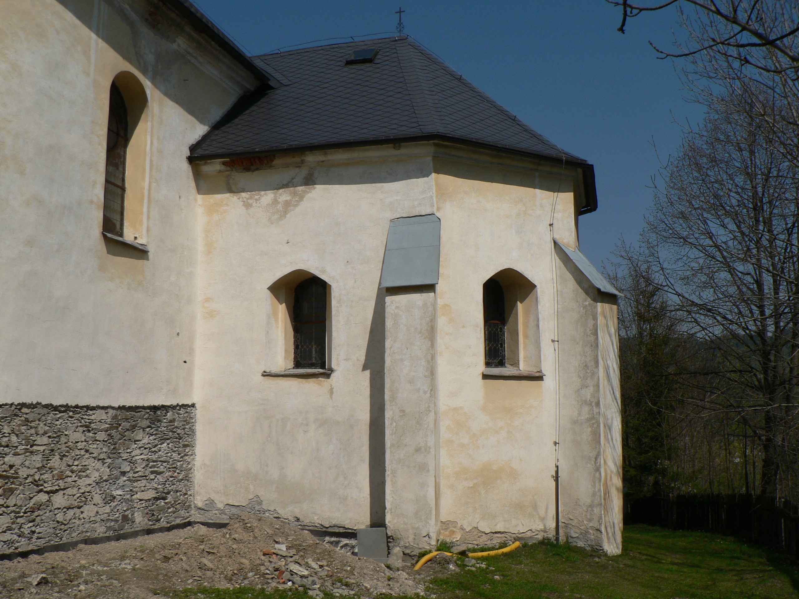 Kostel svatého Jakuba Většího (Dolní Moravice) - gotický původního kostela, dnes kaple.